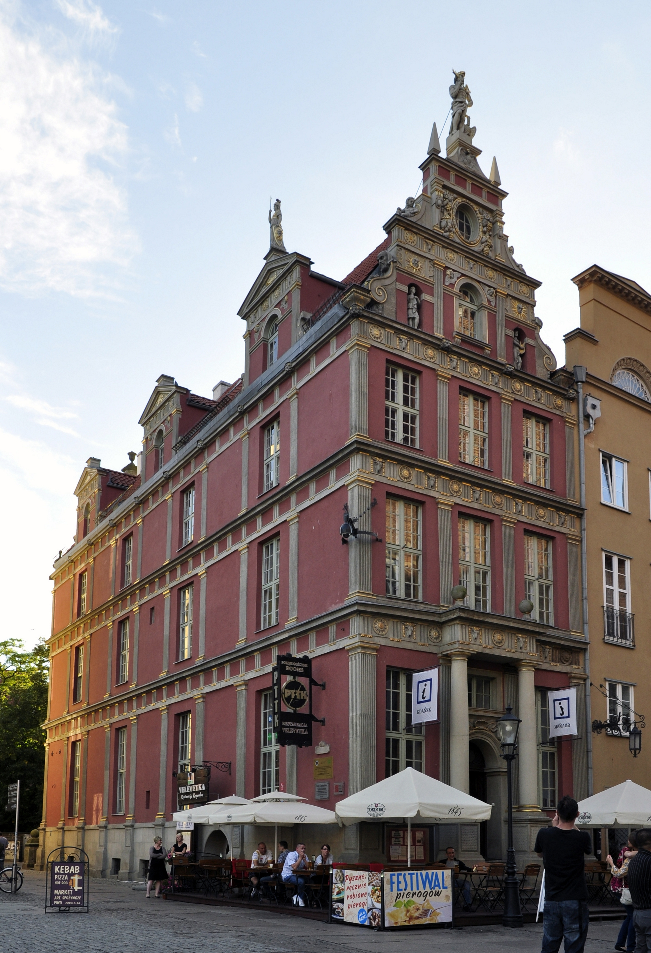 kamienica Conerta i Schumanów Gdańsk, ul. Długa 45